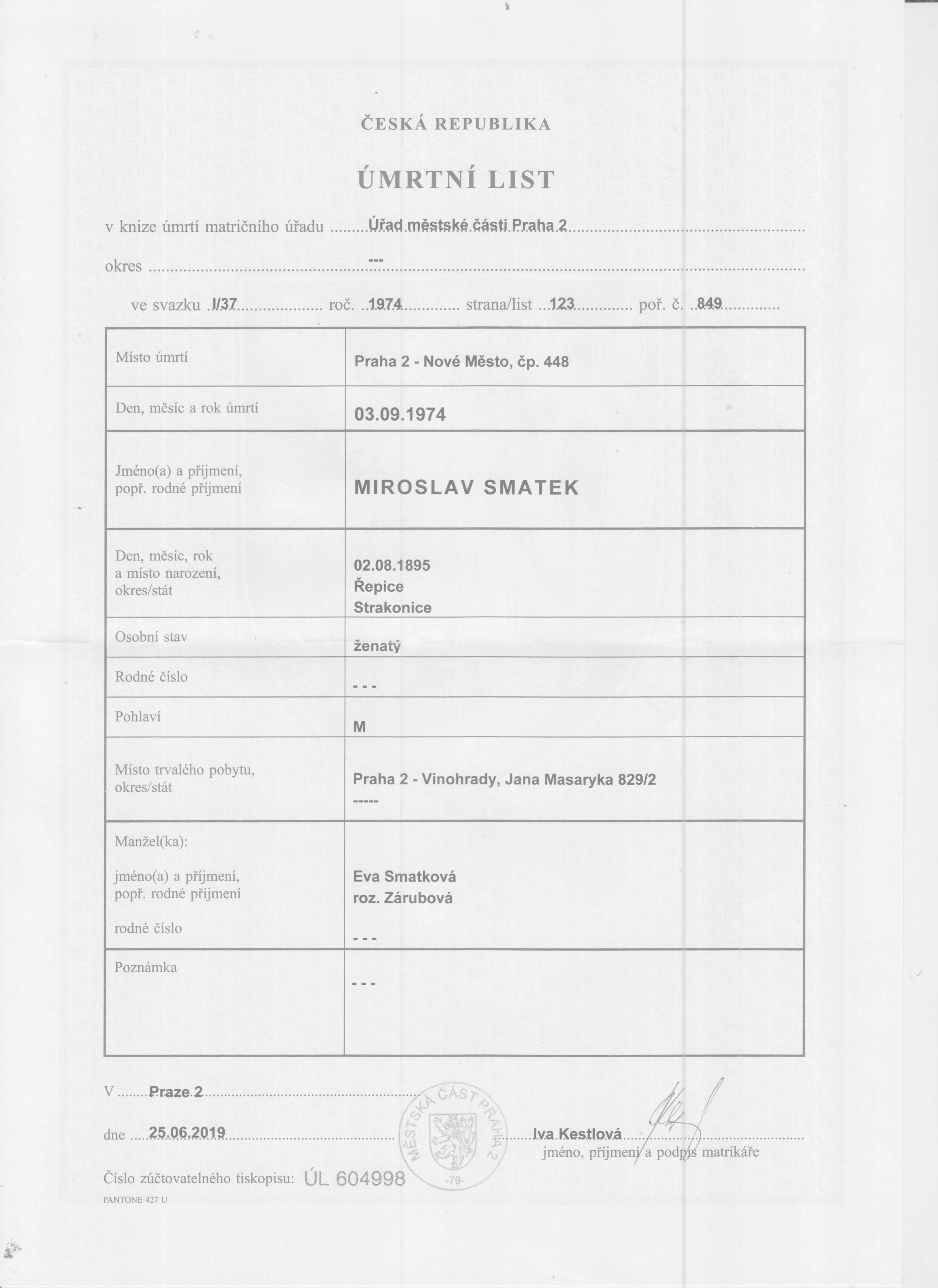 Smatek-úmrt.list